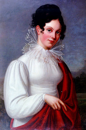 Ölgemälde von Luise Seidler, Goethe-Nationalmuseum in Weimar (1932)